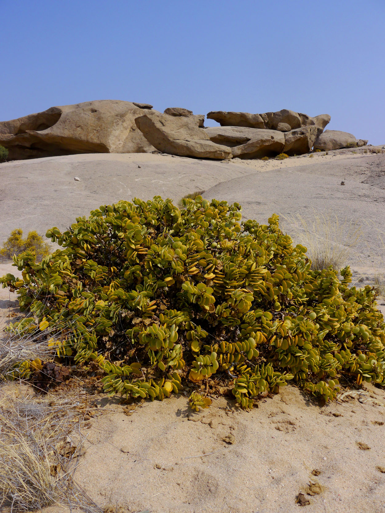 Tetraena (syn. Zygophyllum) stapffii in Vogelfederberg (Namibia).